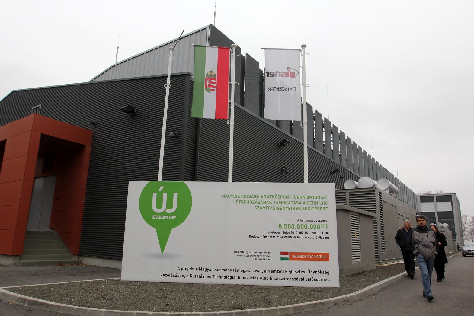 Wigner adatközpont a KFKI területén